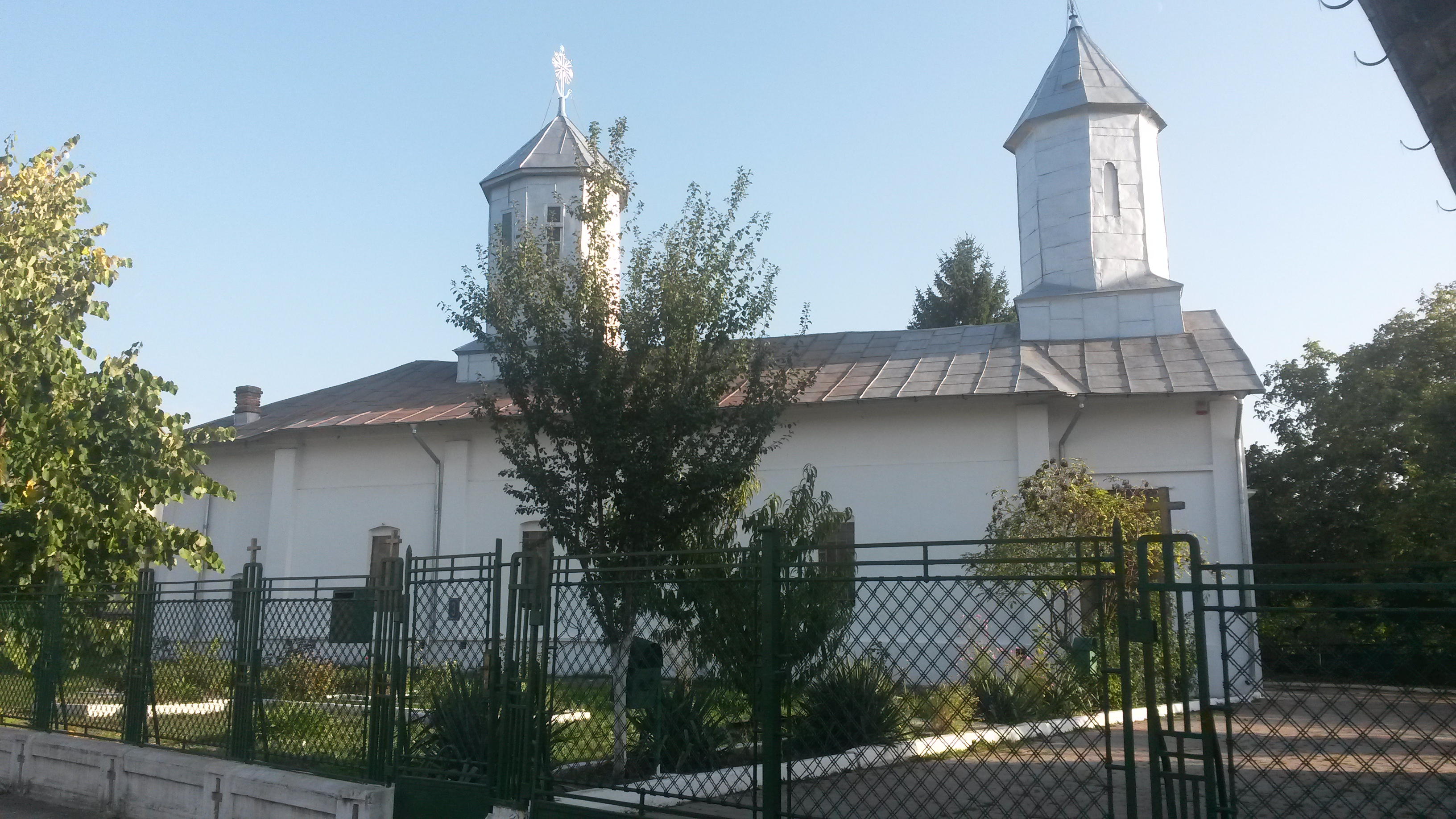 Biserica „Schimbarea la Față”